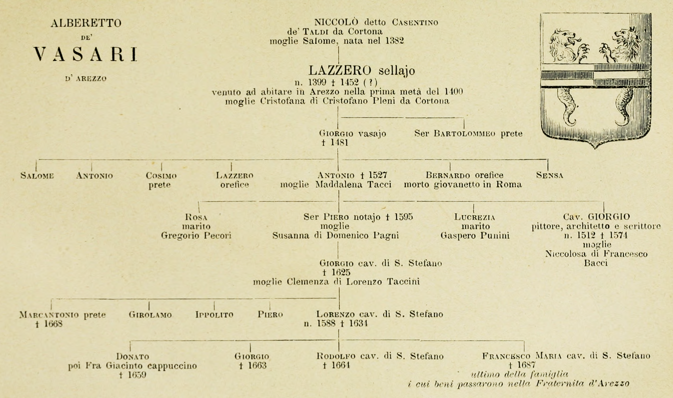 Tableau généalogique de Vasari par Milanesi. Cf. Claude Frontisi, « Vasariana. Un autoportrait inséré », dans Revue de l'Art, 1988-1, p. 30-36 (en ligne).